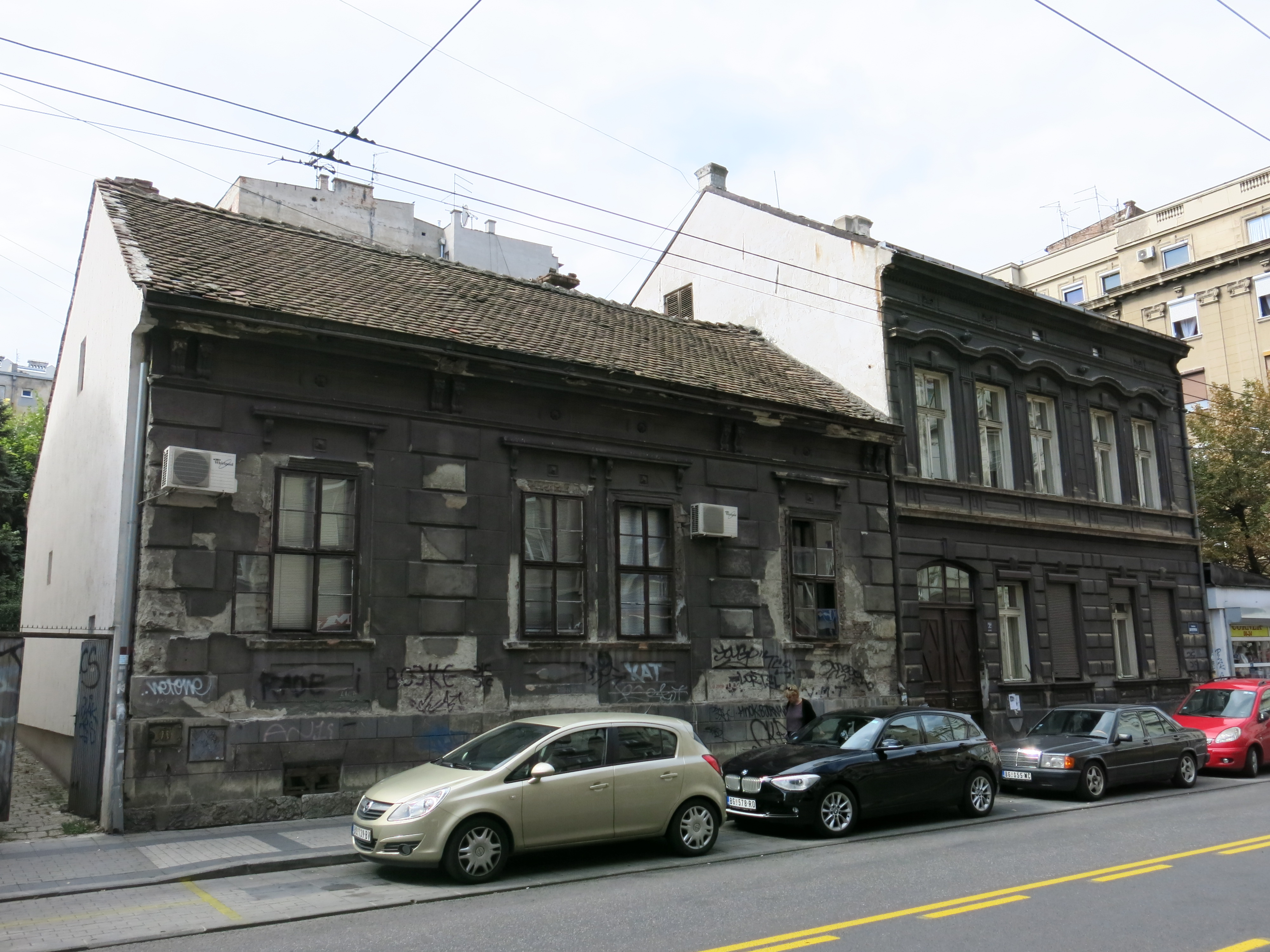 Кућа др Станоја Станојевића